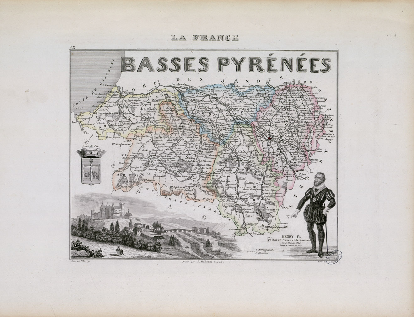 Recueil de 7 cartes départementales dont 3 des Pyrénées-Orientales, et de 6 feuilles de texte explicatif (numérotées de 8 à 13). Le contour des arrondissements est coloré. Ancely, René (1876 - 1966). Possesseur